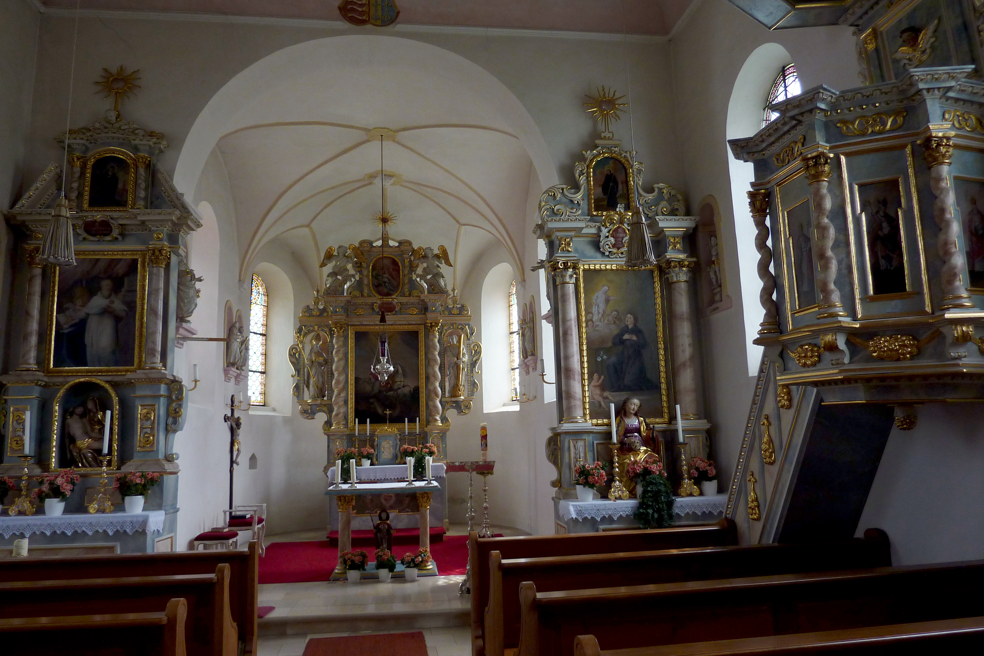 Katholische Filialkirche St. Georg in Unterschöneberg, einem Ortsteil von Altenmünster im Landkreis Augsburg (Bayern), um 1620 errichtet, Innenraum